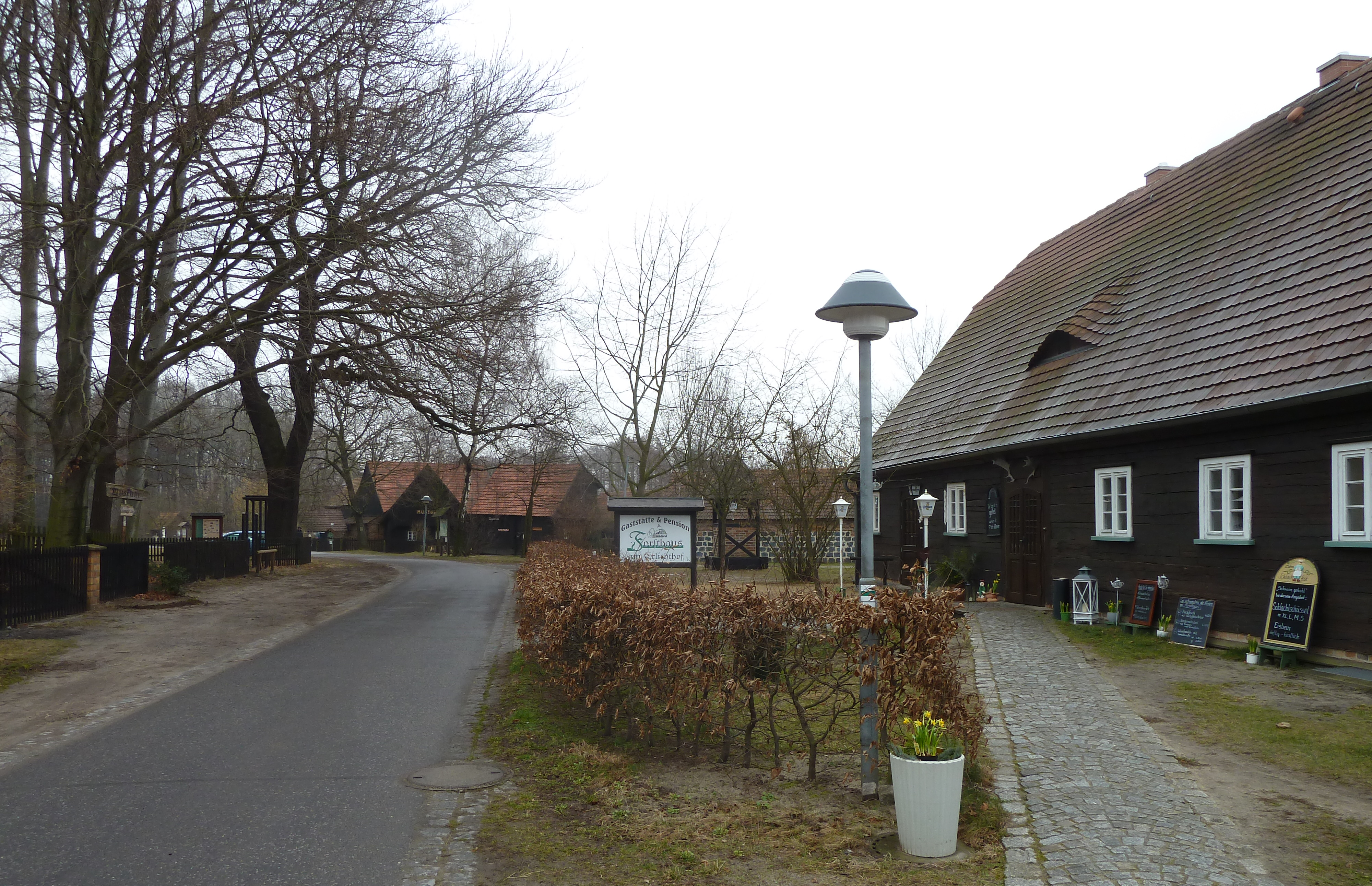 Die Erlichthofsiedlung in Rietschen: Forsthaus Altliebel Nr. 37, Glockenhäuschen mit der von Gerhard Schröder gestifteten Kanzlerglocke, im Hintergrund der namensgebende Erlichthof, vormals Mocholz Nr. 31.